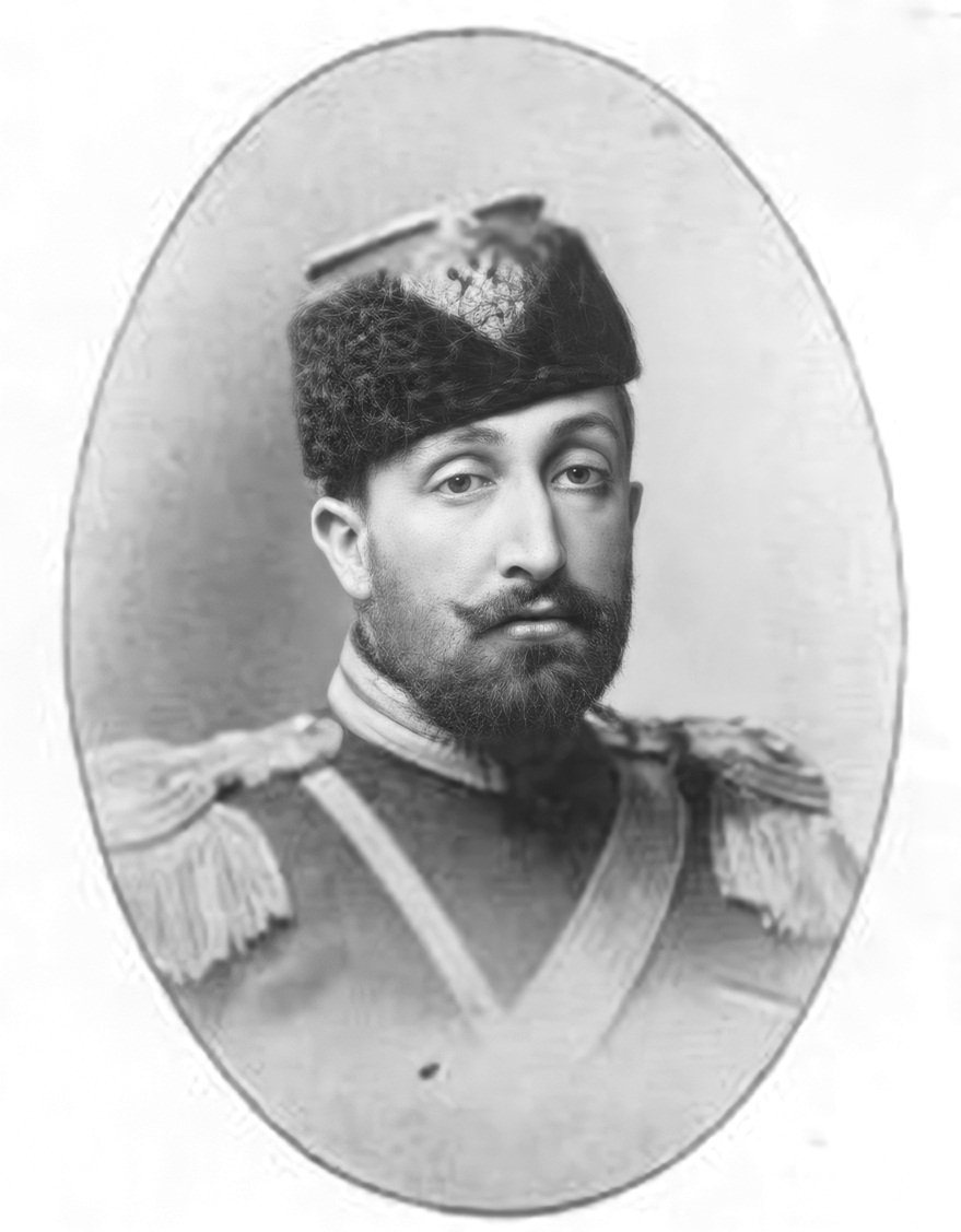 Napoleon L.J.,Bonaparte, foto z 1895, w: Wrangel, Europas suveräna furstehus, Stockholm 1901, scan:AvF